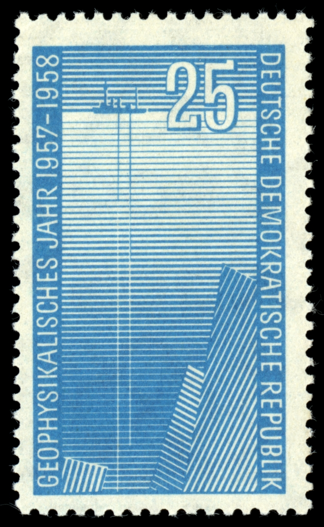 Information: Ausgabepreis: First Day of Issue / Erstausgabetag: Auflage: Entwurf: Druckverfahren: Michel-Katalog-Nr: Ländercode-MiNr